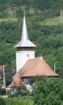 Mészkő, Kolozs megye, Erdély